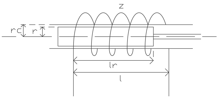 Schemat czujnika indukcyjnego z opisanymi parametrami.